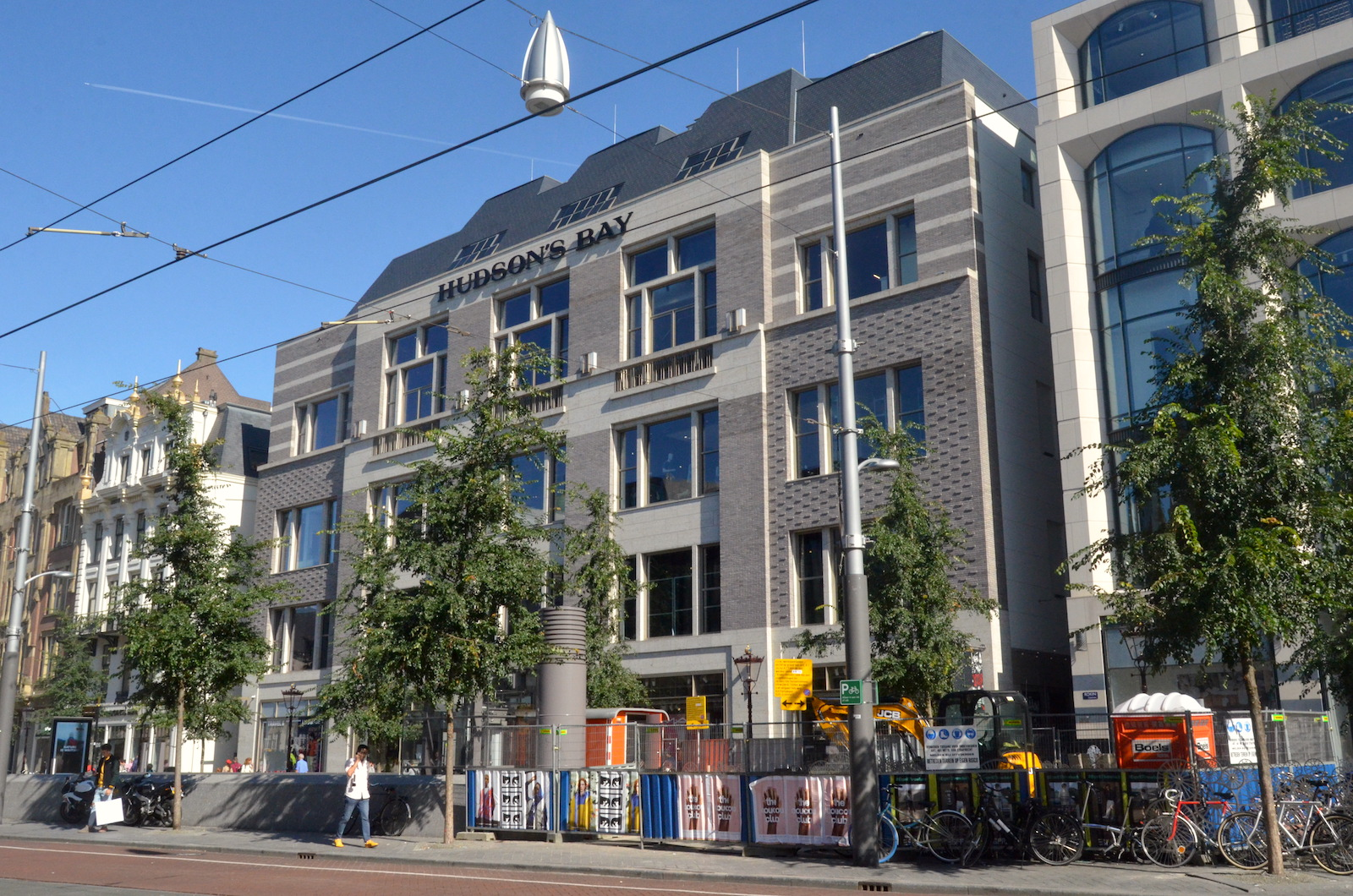 Hudson's Bay aan het Rokin in Amsterdam; 20 september 2019. Foto: Erik Swierstra.